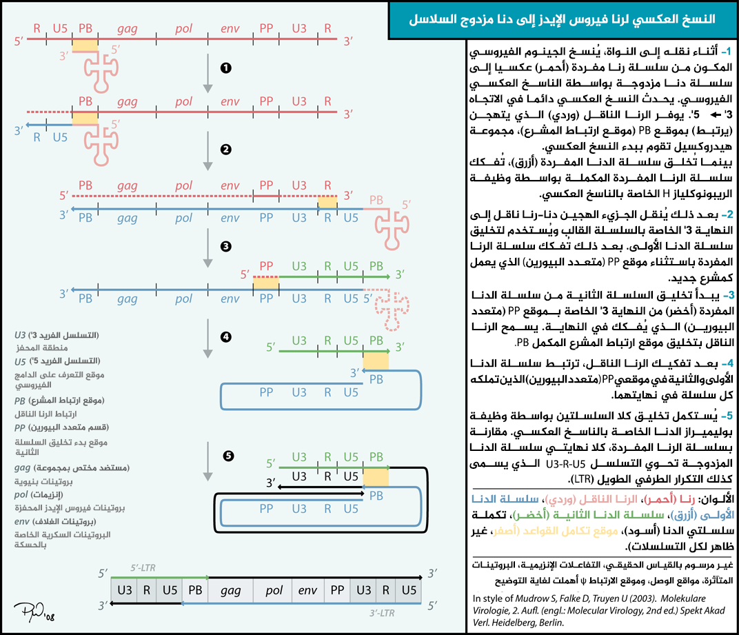 خطوات النسخ العكسي لجينوم فيروس الإيدز المكون من سلسلة رنا مفردة إلى سلسلة دنا مزدوجة، ليتم دمجها في جينوم المضيف.